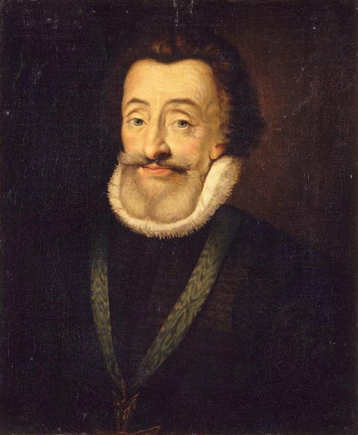 Portrait en buste du roi Henri IV.